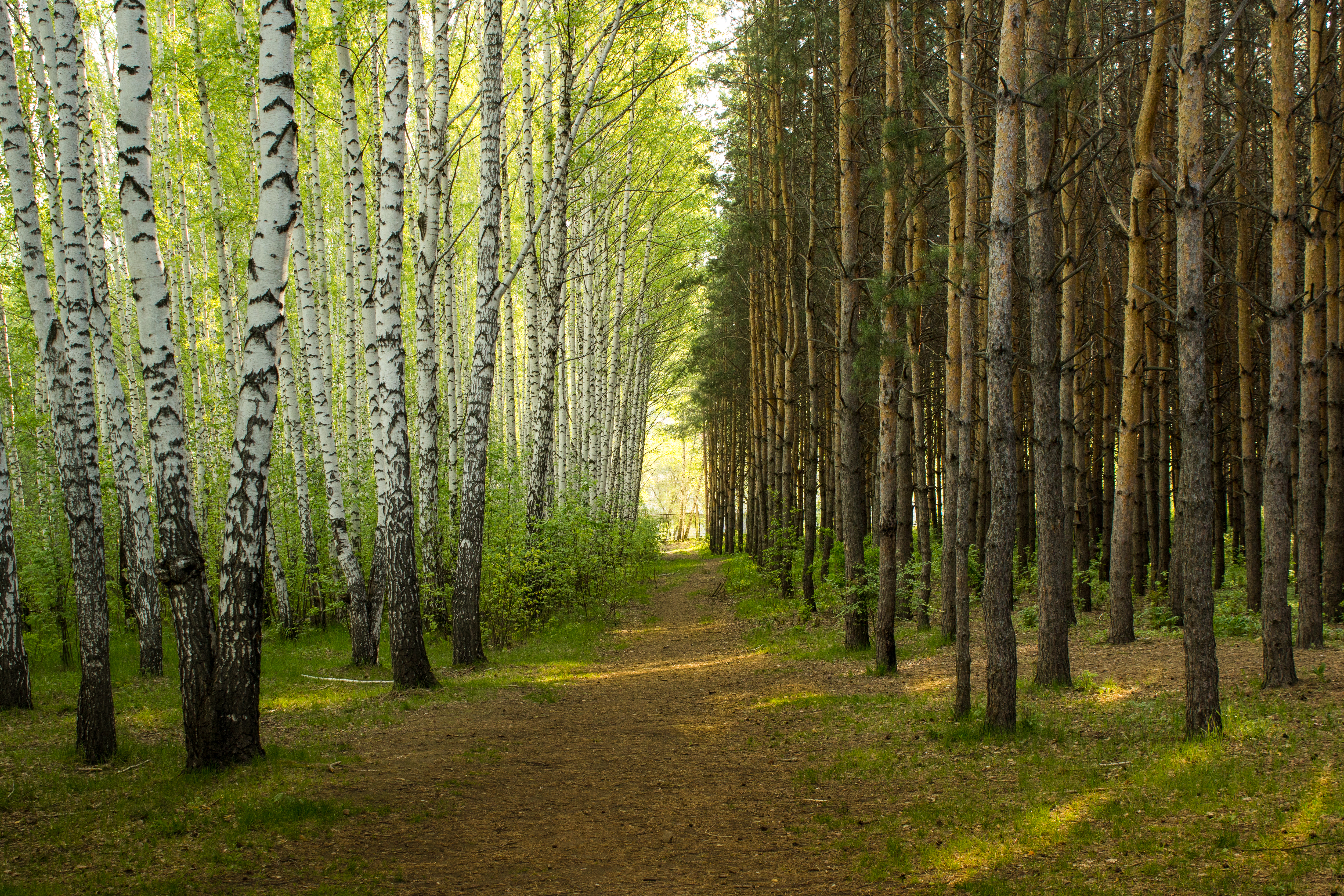 Дендрологический парк: Новосибирск, Новосибирская область This image is related to the protected area of Russia number 5410086